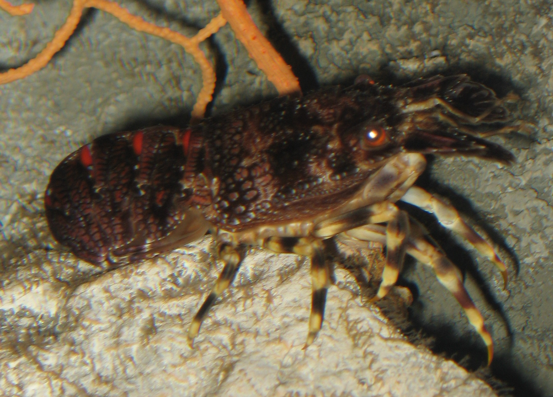 Scyllarus arctus in Aquarium Cinéaqua Map: 48° 51' 44" N 2° 17' 27" E